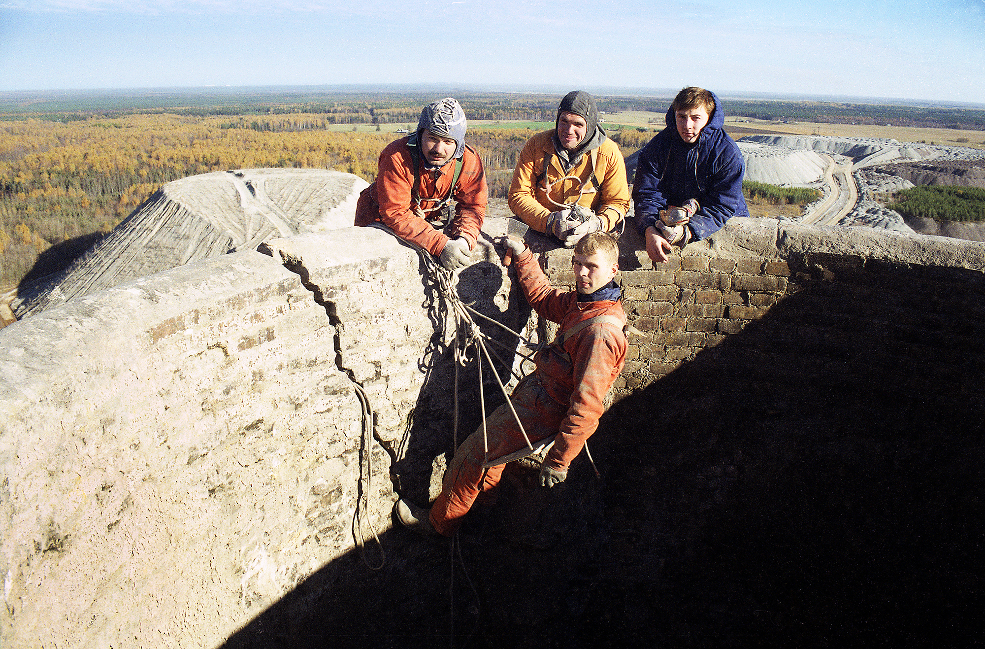 Ahtme soojuselektrijaama katlamaja korstna remont 60 meetri kõrgusel. 1996